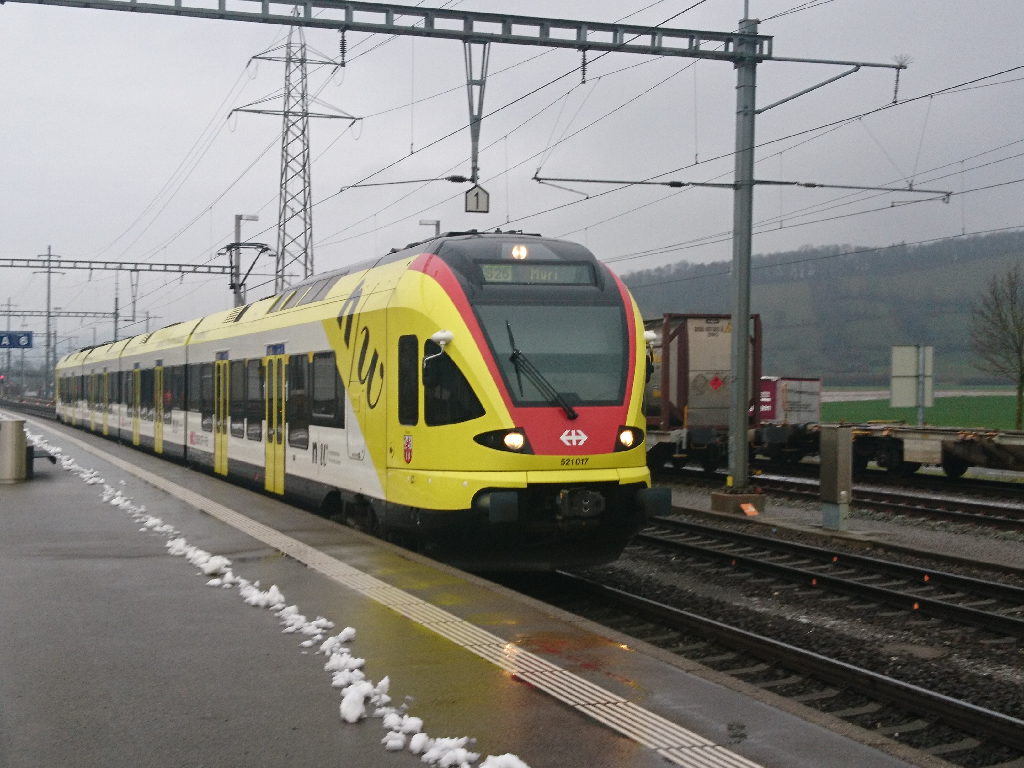 SBB RABe 521 017 mit Werbung für FHNW als S25 in Lupfig